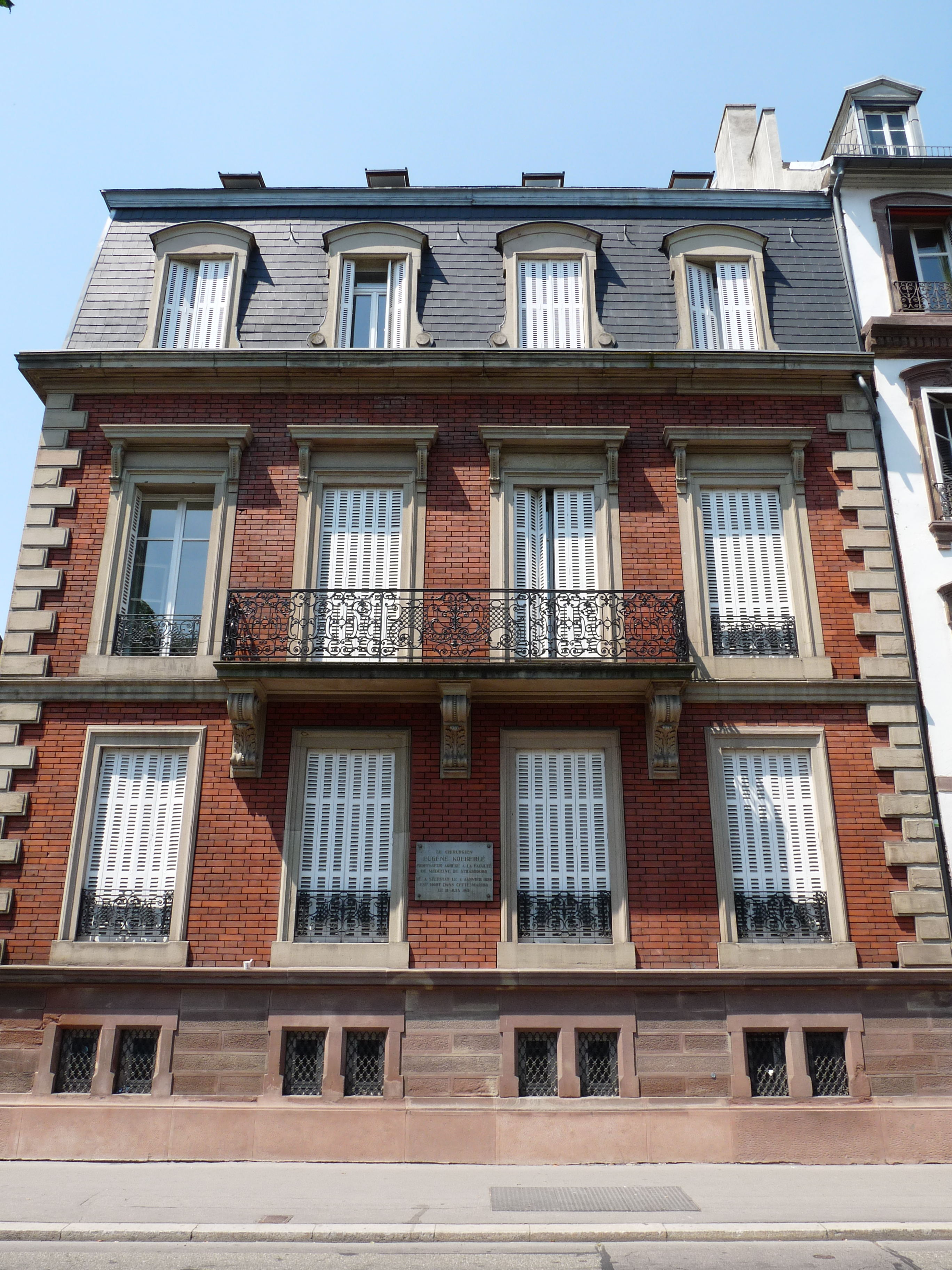 Maison de Strasbourg (14, quai Kléber) où mourut le docteur Eugène Koeberlé le 13 juin 1915